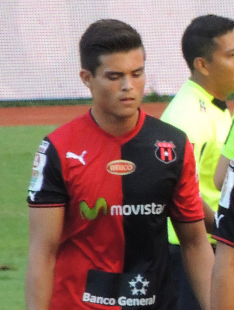 Esta obra de Luis Manuel Madrigal está bajo una licencia de Creative Commons Reconocimiento-CompartirIgual 4.0 Internacional. Para una versión sin logo escriba a